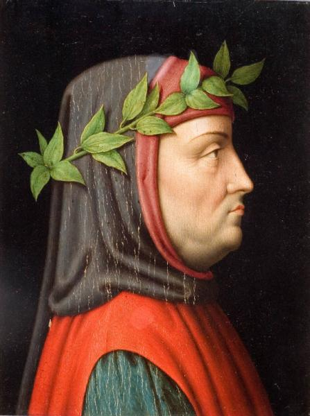 Ambito culturale: ambito lombardo. Descrizione: Il personaggio è raffigurato a mezzo busto, di profilo, con veste verde scura con cappuccio, coperta da giubbotto rosso senza maniche. Rosso anche il risvolto del cappuccio attorno al viso. Sul capo una corona d'alloro con foglie verde pallido. Notizie storico-critiche: La tavoletta fa parte di una serie di quattro raffiguranti altrettanti poeti [...], che appartengono tutte evidentemente ad una stessa mano. Sul retro di una di esse si legge "attribuito ad Angelica Kaufmann". L'attribuzione dovrebbe stendersi anche a questo ritratto di Petrarca. L'autore però è piuttosto un modesto artista della prima metà del secolo XIX. L'opera fu trafugata insieme alle altre nel 1997 e venne recuperata l'anno successivo.